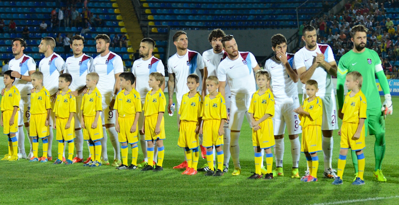 Rostov ile oynanan UEFA Avrupa Ligi karşılaşmasında Trabzonspor kadrosu.